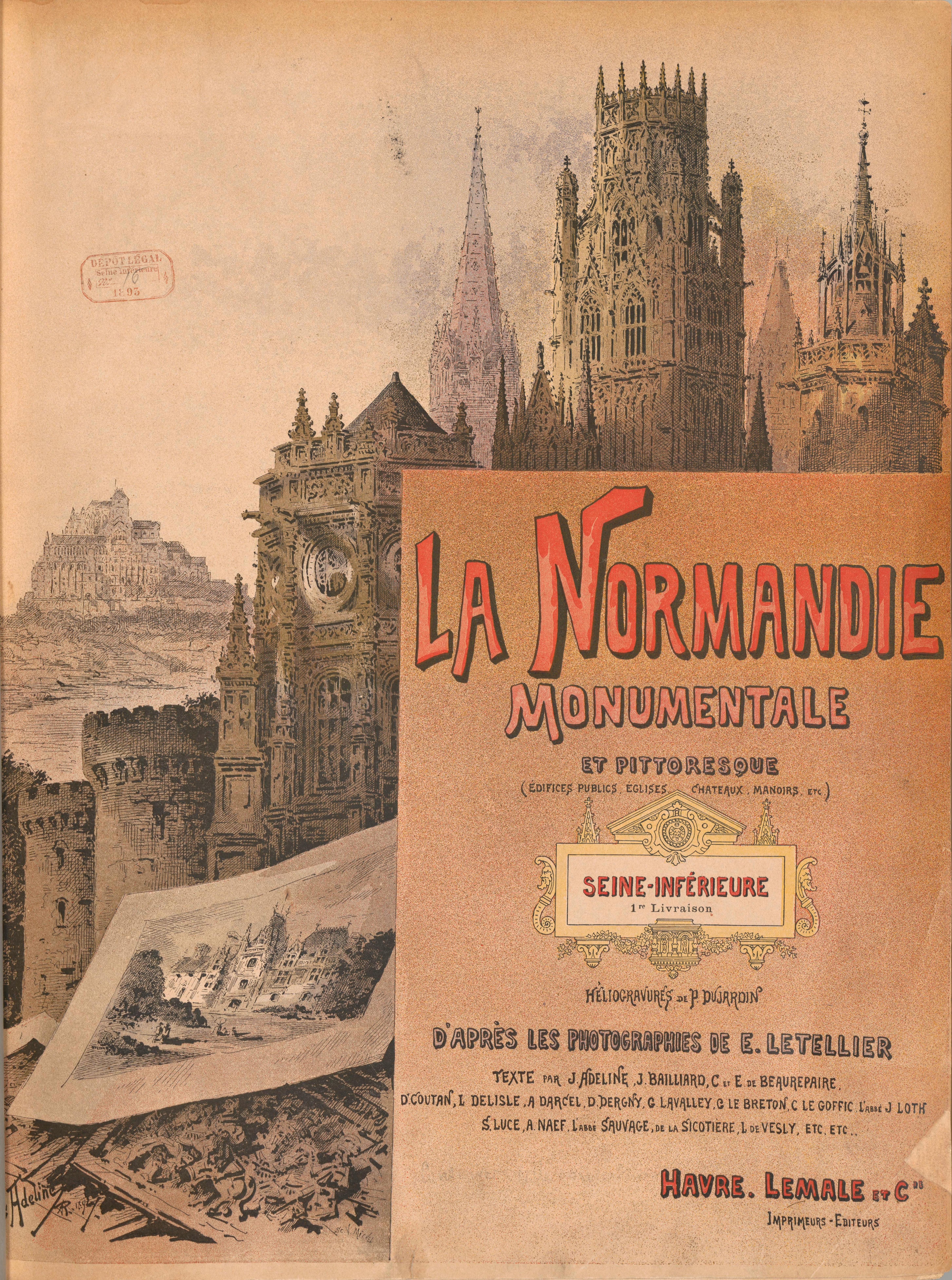 La Normandie monumentale et pittoresque, édifices publics, églises, châteaux, manoirs, etc.,,. Tome I, Seine-Inférieure. Éditions Lemasle et Cie, Le Havre, 1893. Couverture illustrée par Jules Adeline.